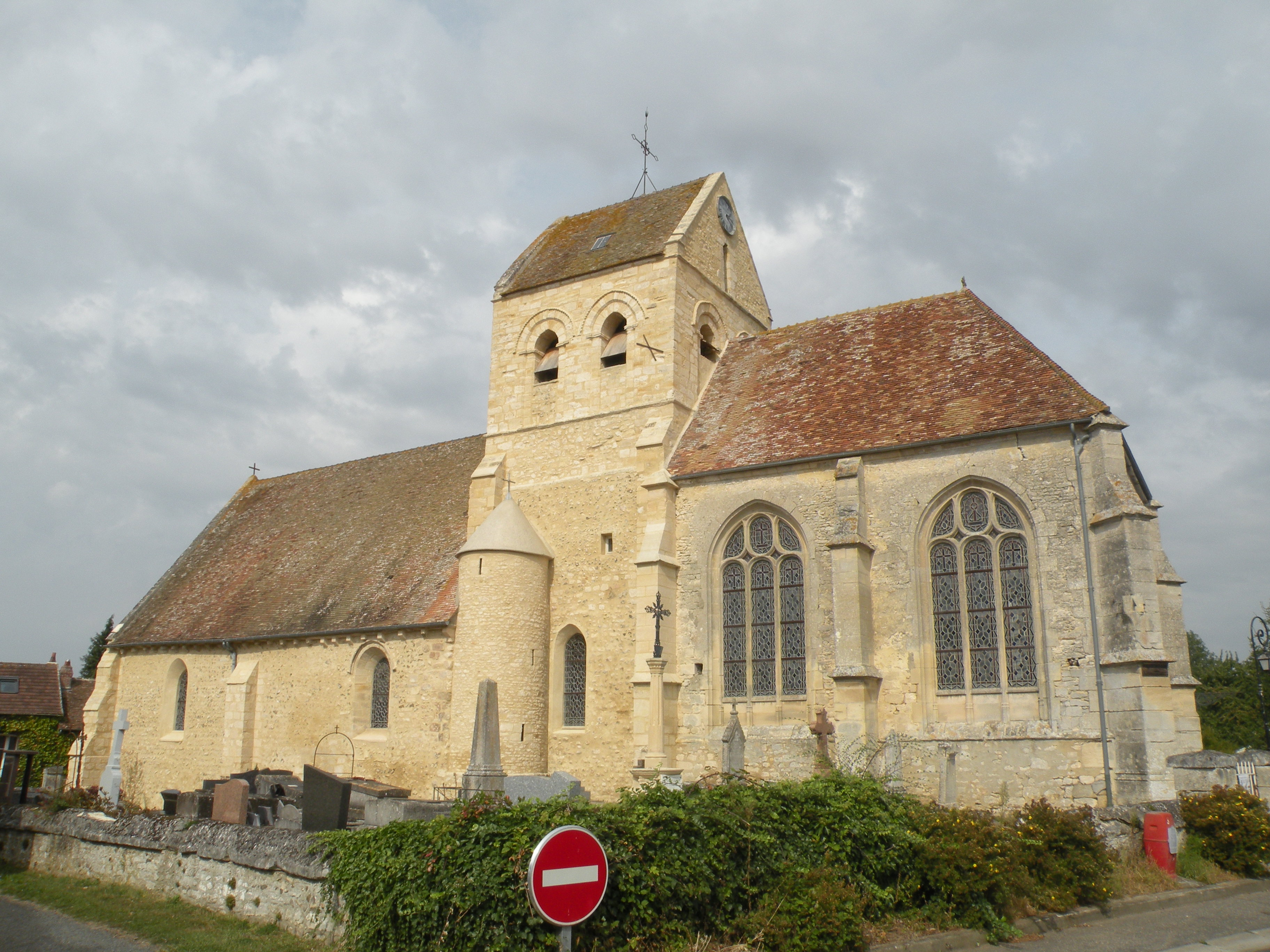 Église Saint Lucien de Loconville